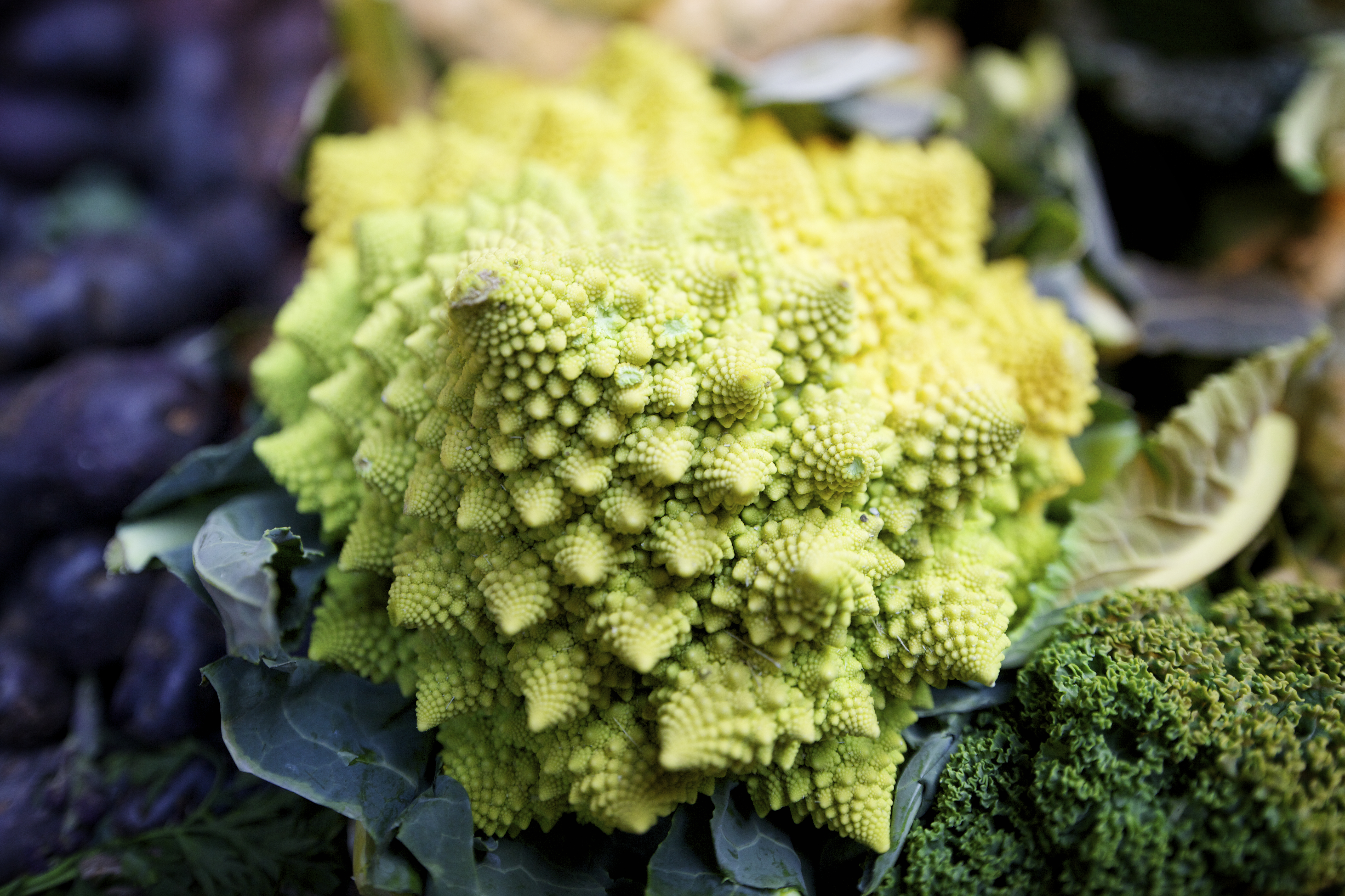 Romanesco broccoli.